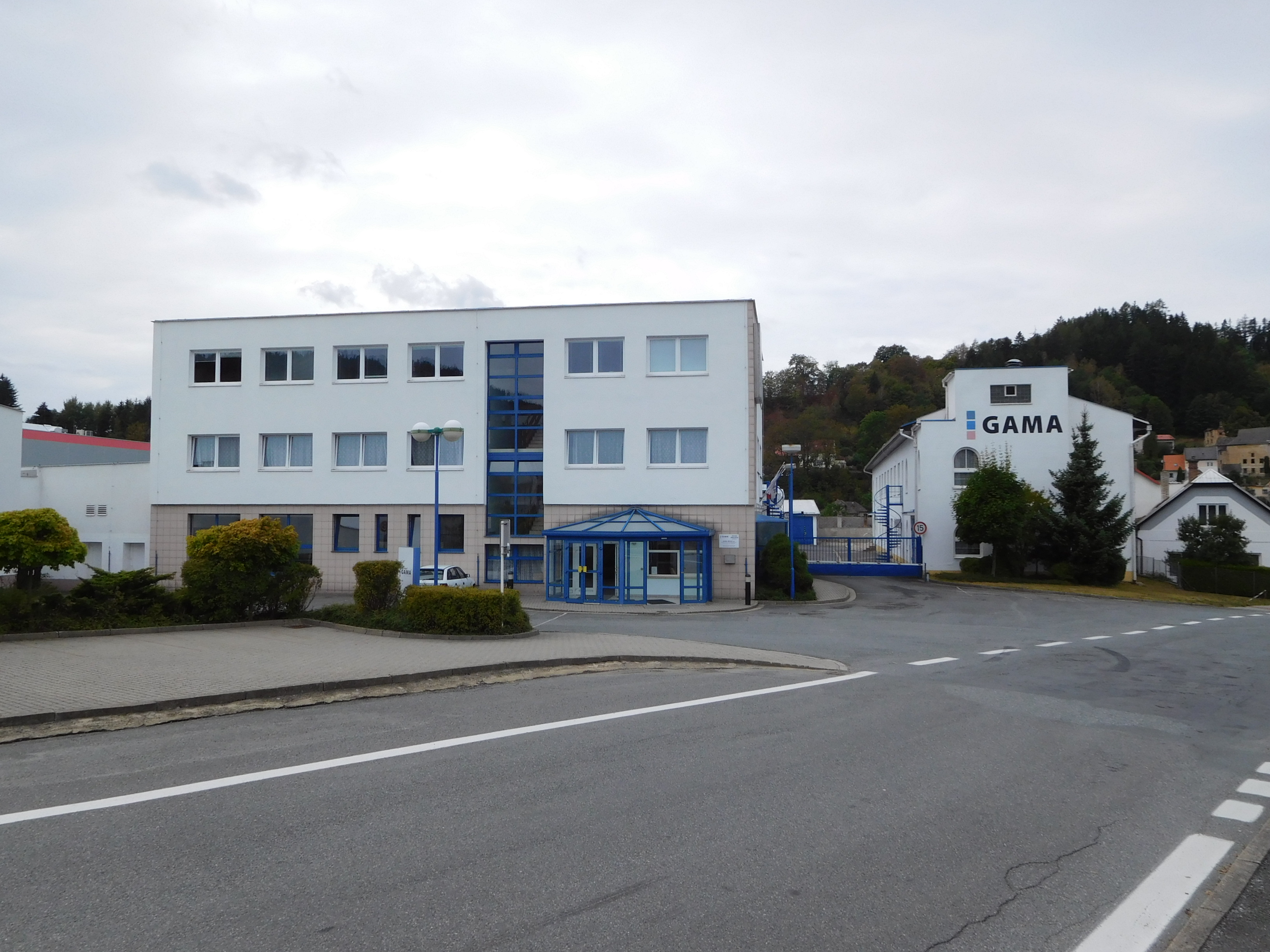 Benátky - Ubušínská 20, továrna GAMA Group